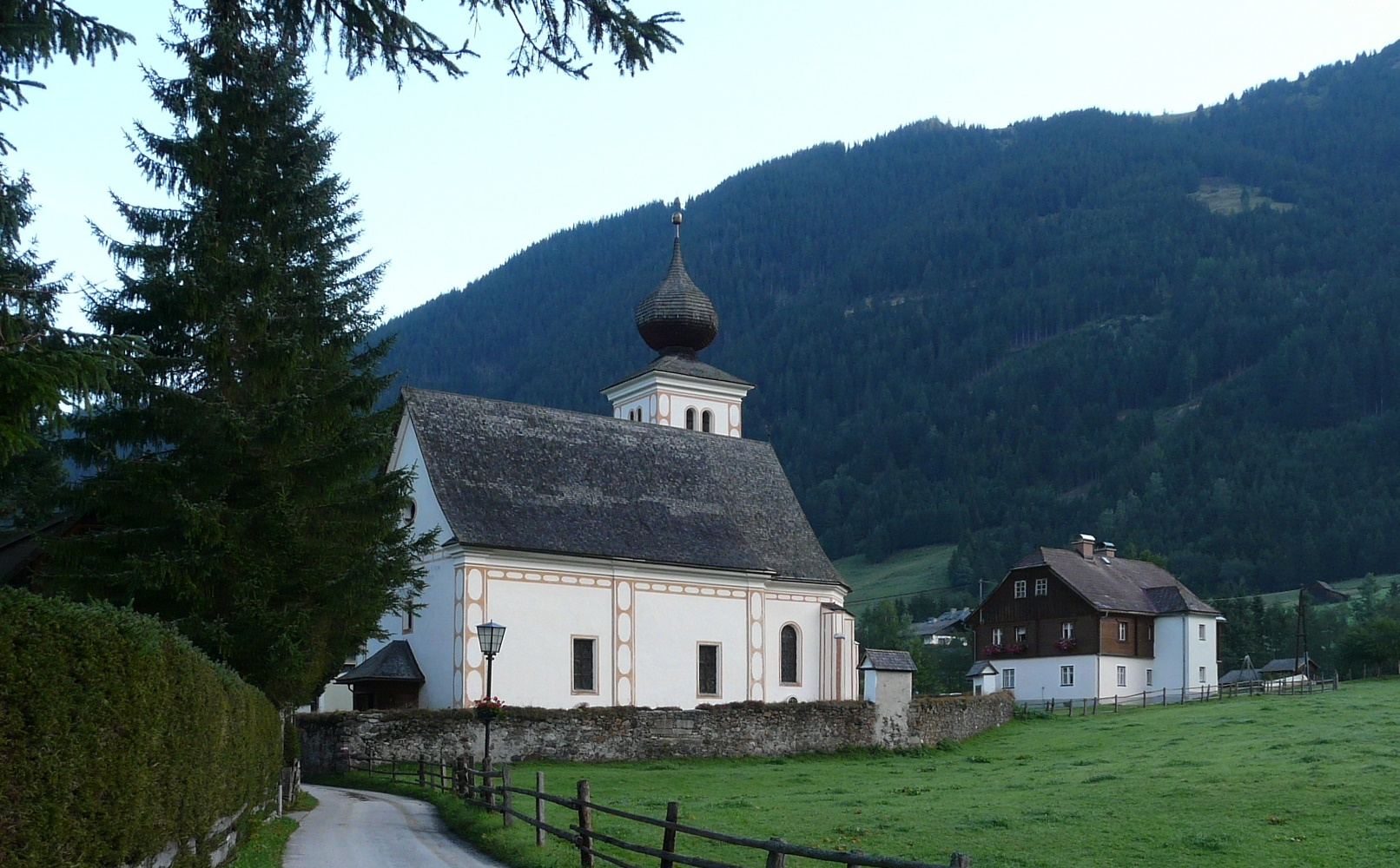 Kirche mit Friedhof in St. Nikolai im Sölktal